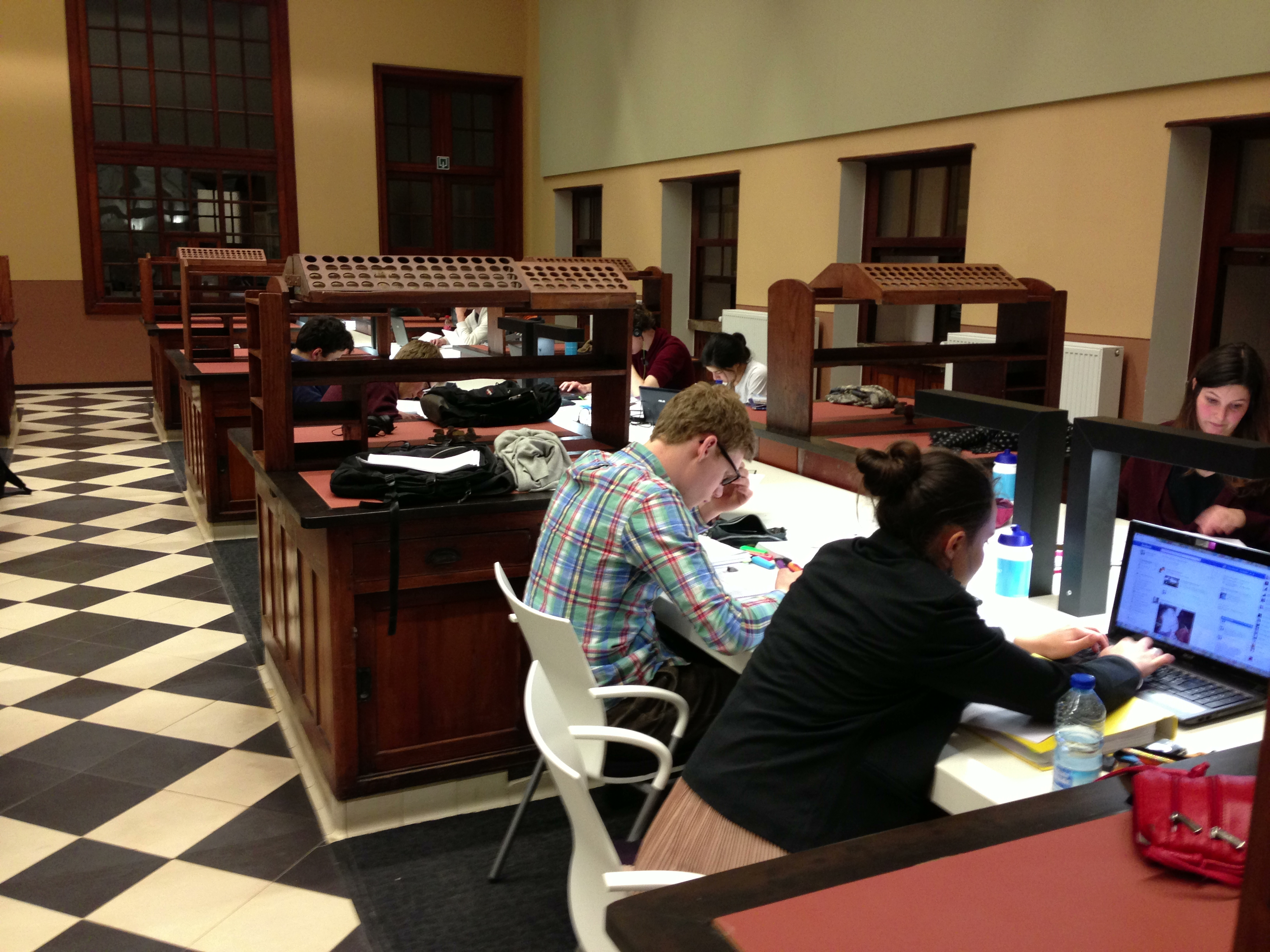 Studenten studeren in openbaar leercentrum AGORA